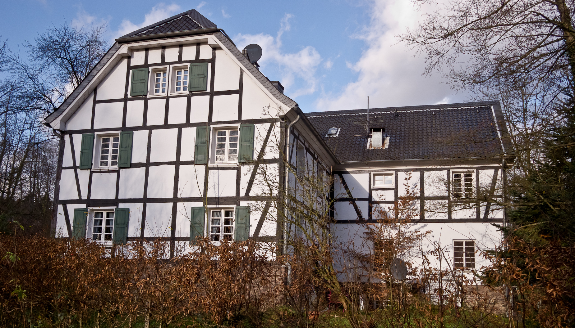 Rösrath, Denkmalnummer 19, Zum Eulenbroicher Auel 15 (Klostermühle)